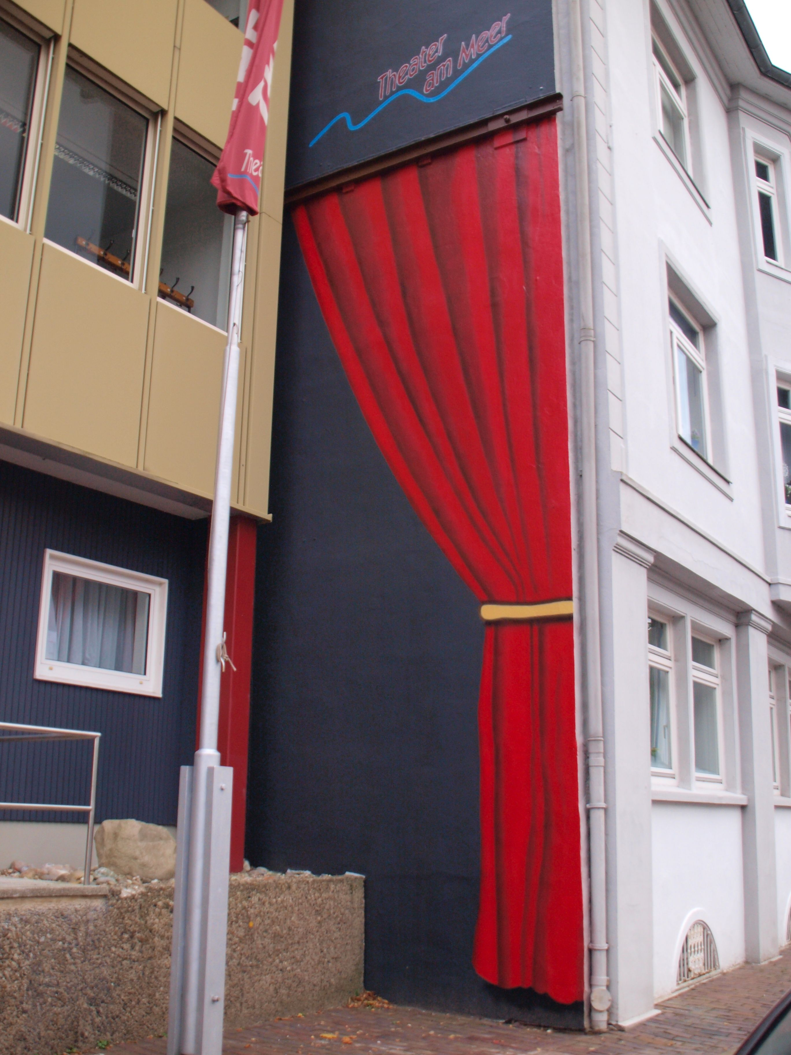 Graffiti "geöffneter Vorhang", Wandbild Theater am Meer